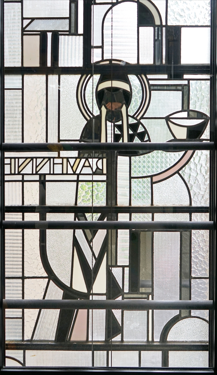 Détail (Ravenne - lisible à l'envers) de vitrail de façade de l'atelier Louis Barillet vu de l'intérieur